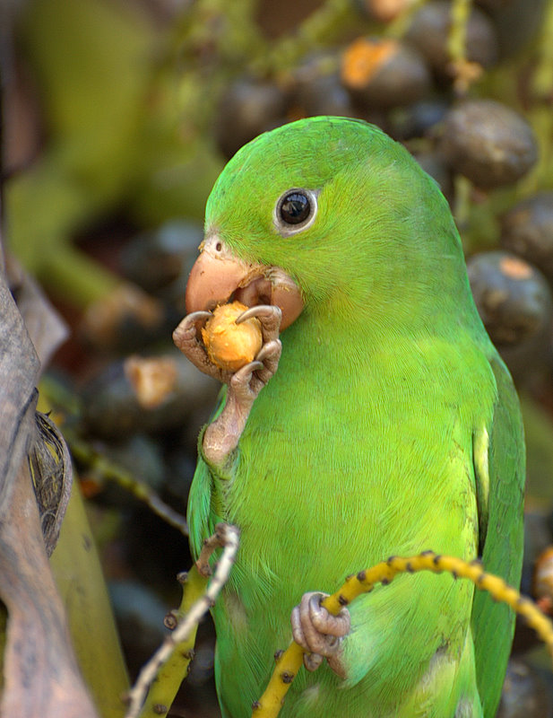 Parque da Independência, Museu do Ipiranga, São Paulo